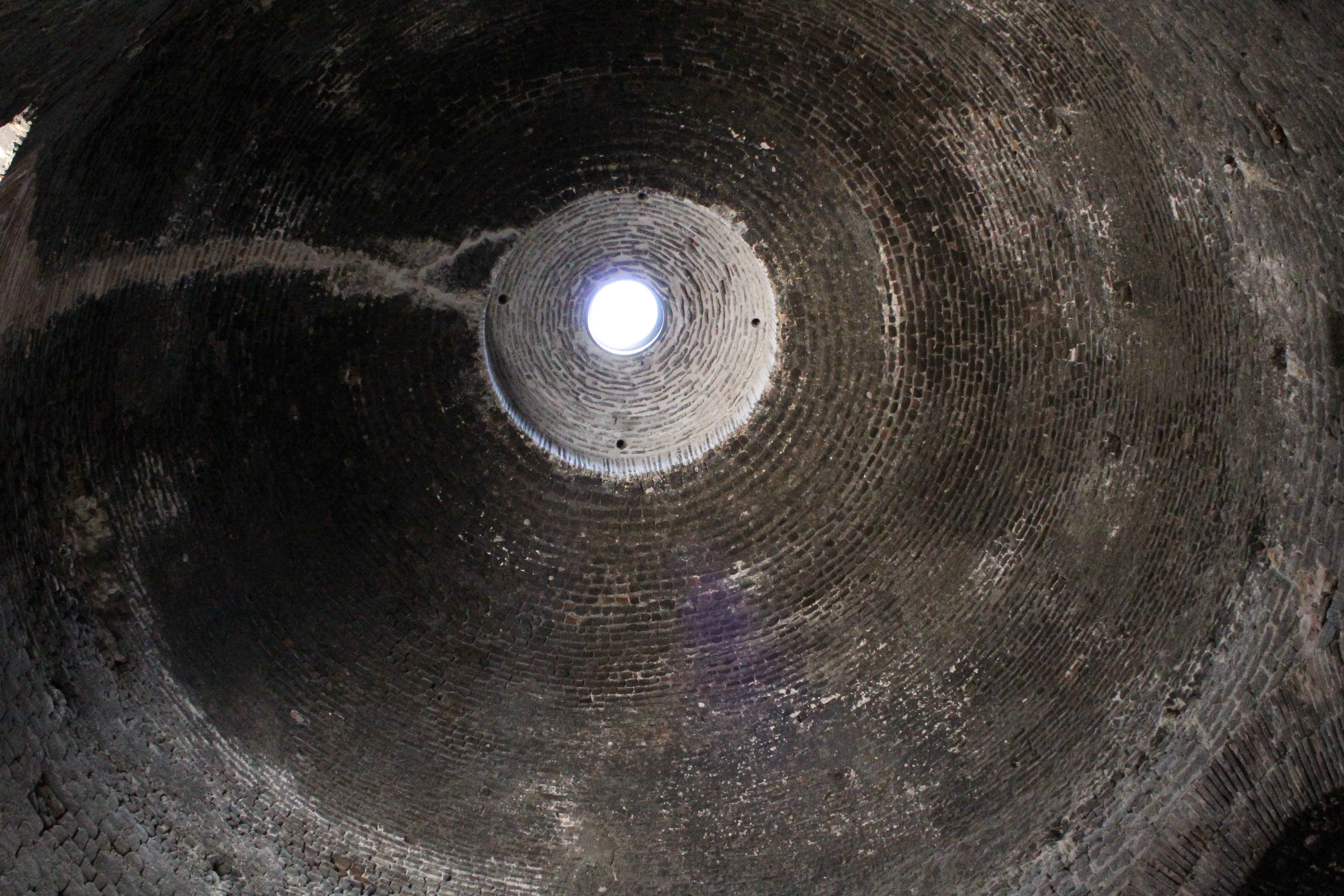 Rote Halle, Pergamon, Westtürkei, Kuppel des Südturms